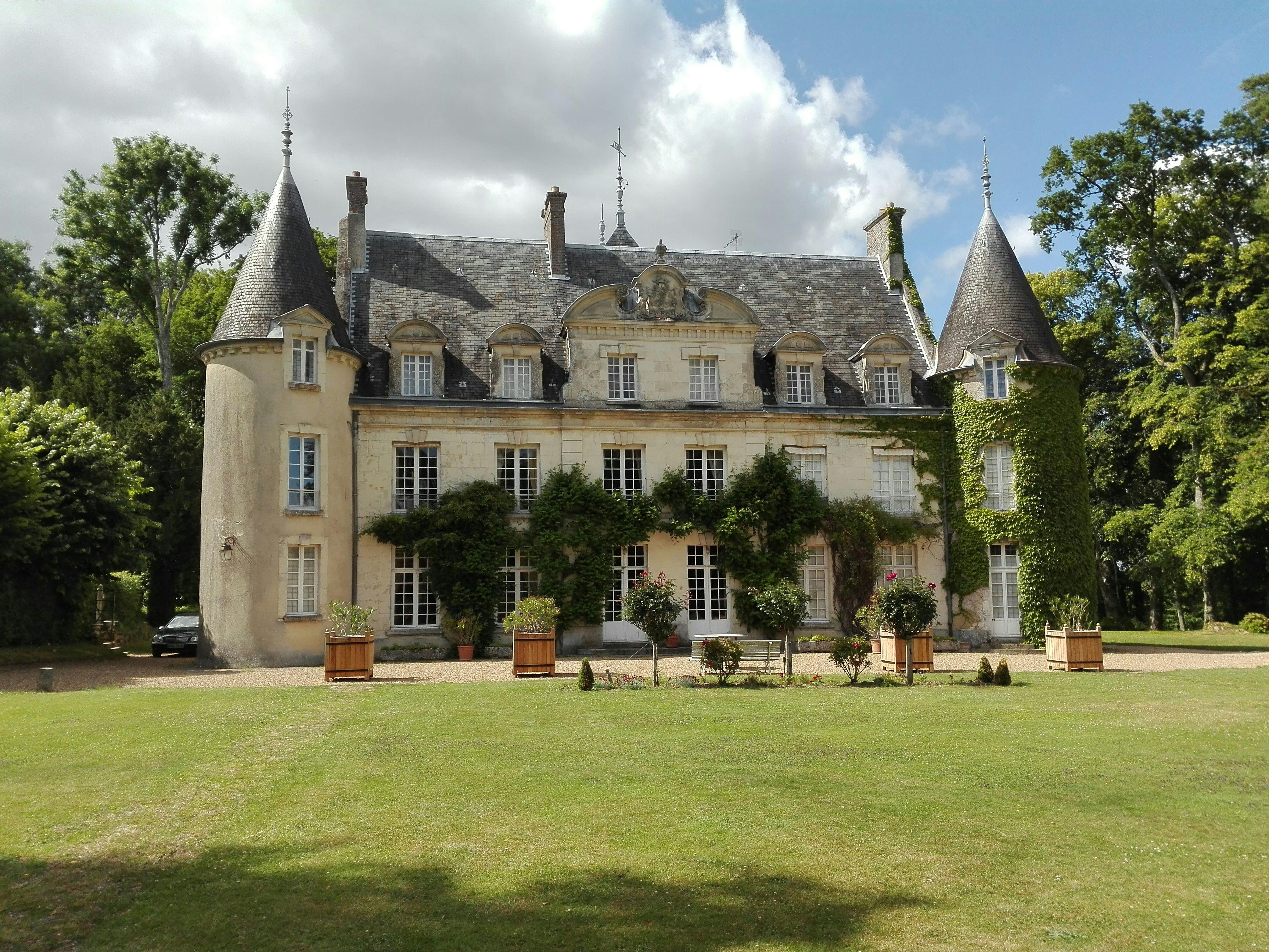 Château à Saint-Denis-sur-Huisne dans le Perche